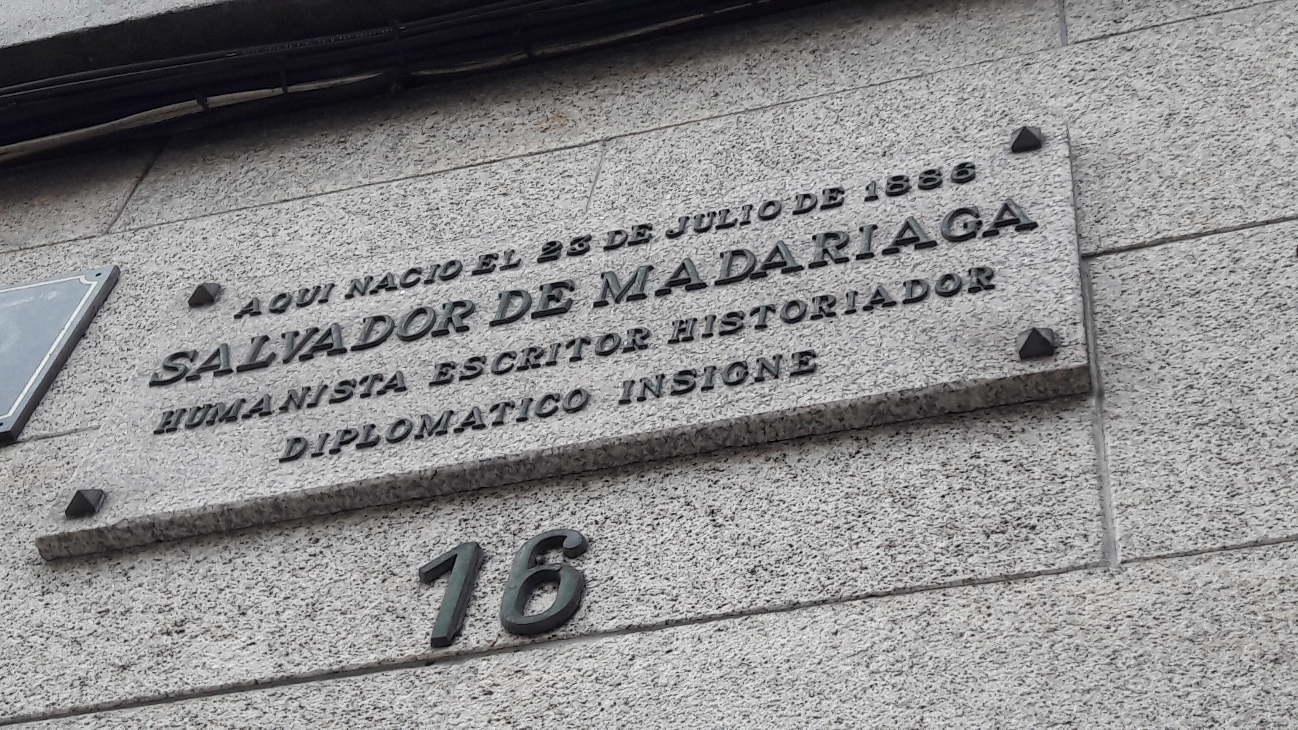 Placa no lugar de nacemento de Salvador de Madariaga, na rúa do Orzán da Coruña